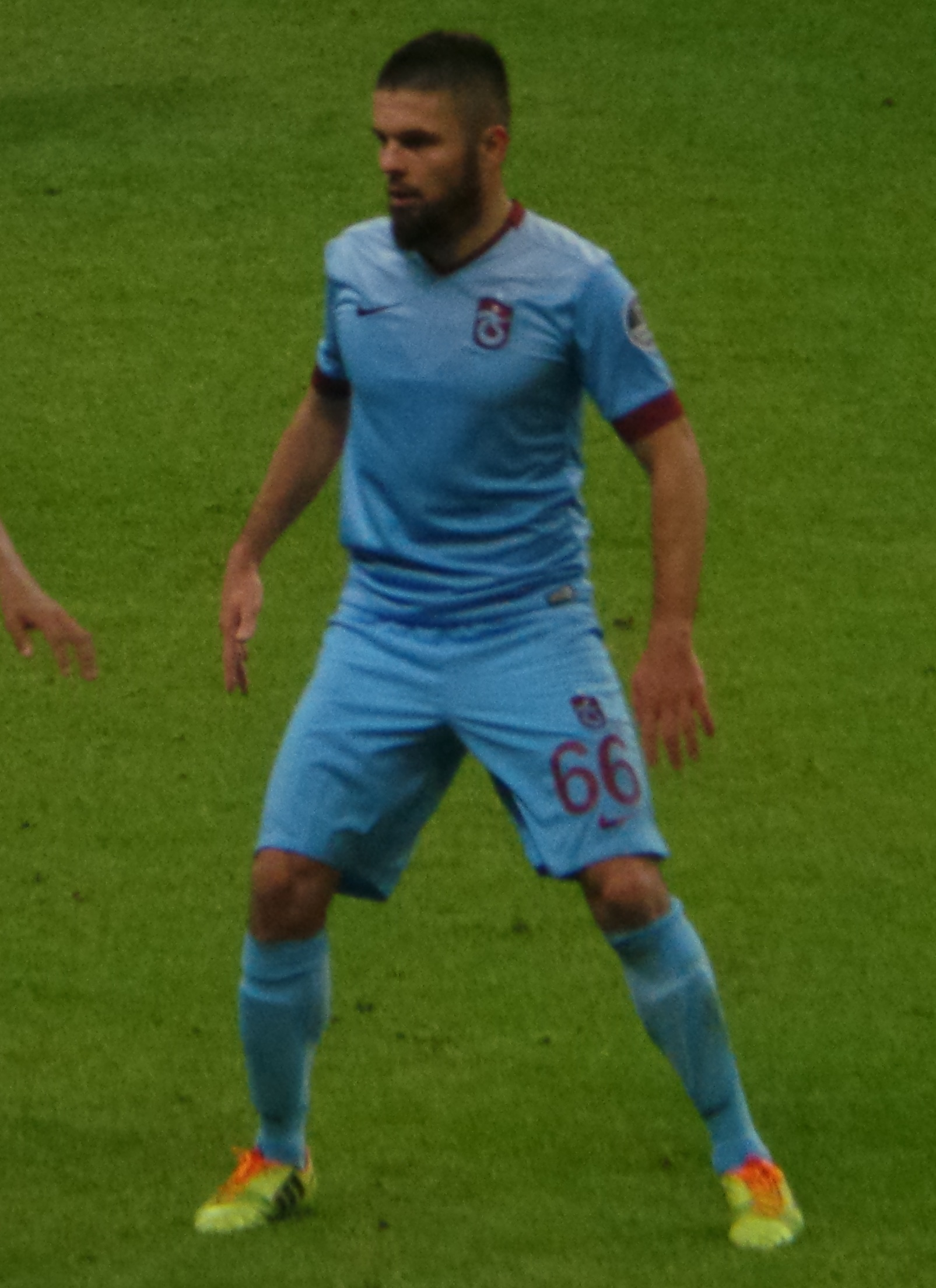 Fatih Atik Trabzonspor formasıyla